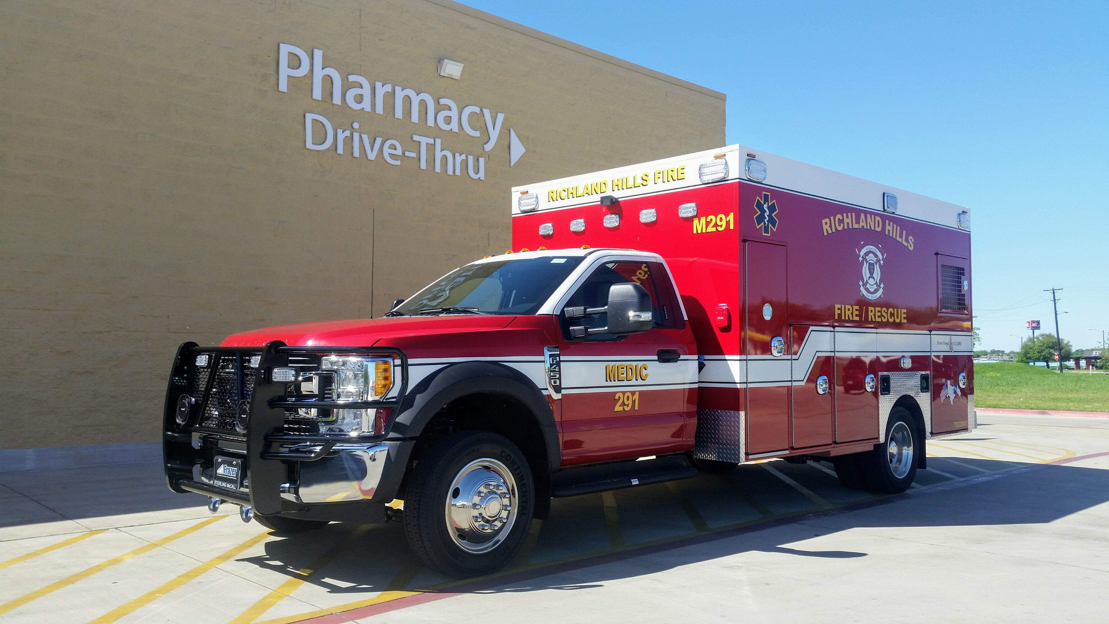 Richland Hills Fire Rescue Medic 291